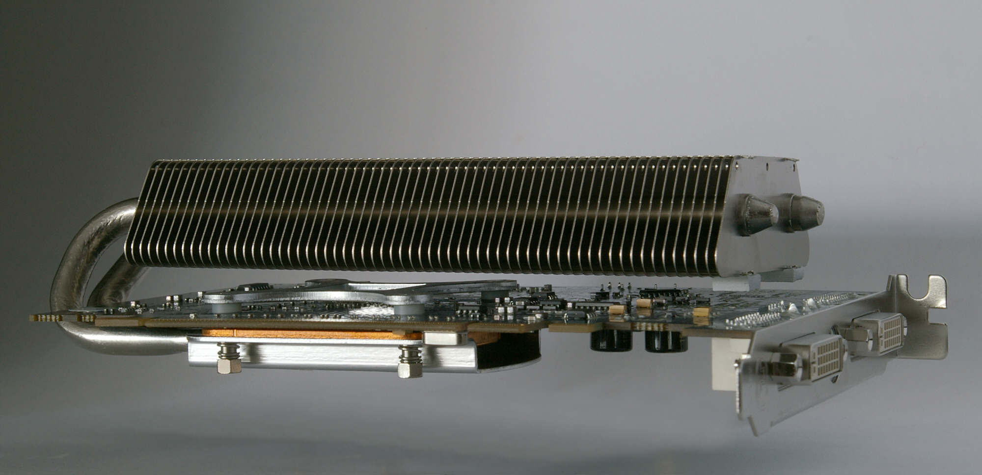 Grafikkarte mit Kühlung per Heatpipe. (Sapphire Radeon X1650 pro ultimate)